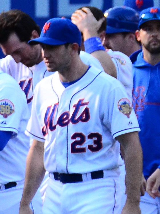 Mike Baxter